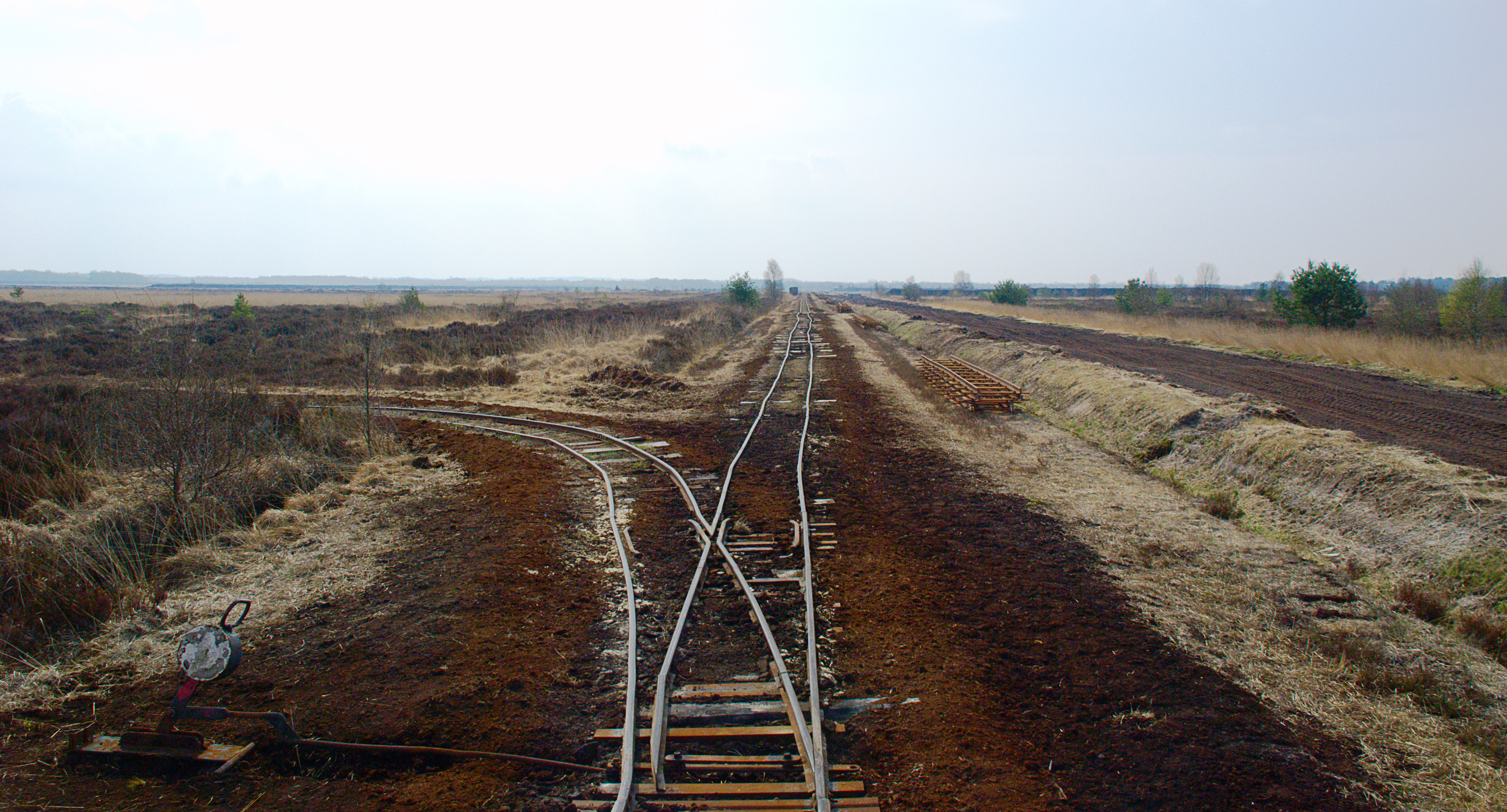 Torfförderung im Huvenhoopsmoor; Schmalspurbahn